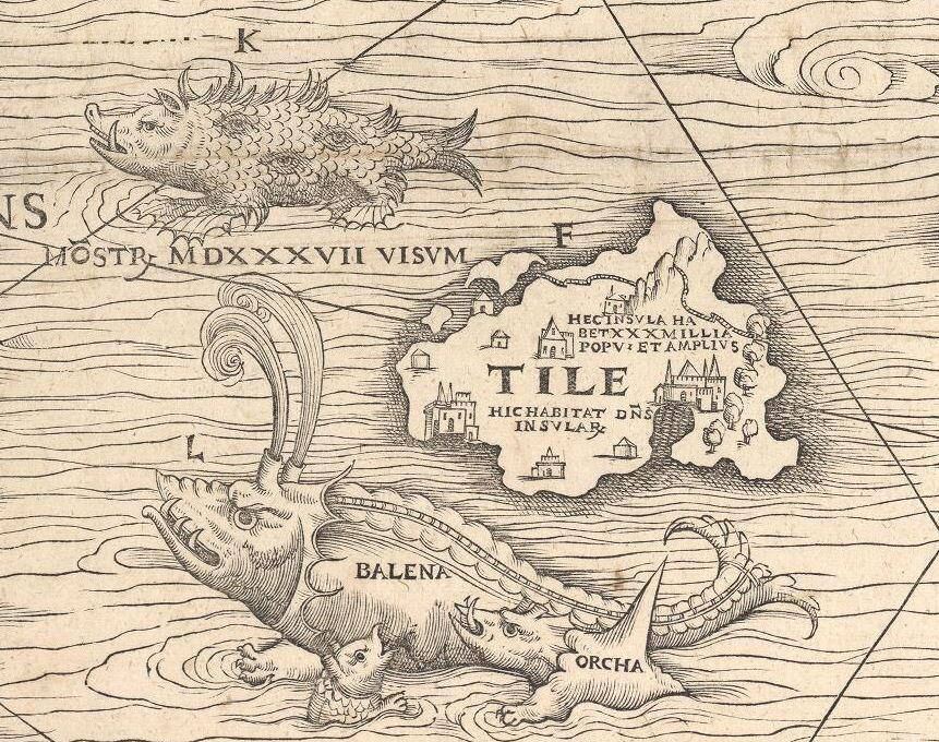 Utsnitt av Carta Marina visandes ödet fiktiva landet "Tile"